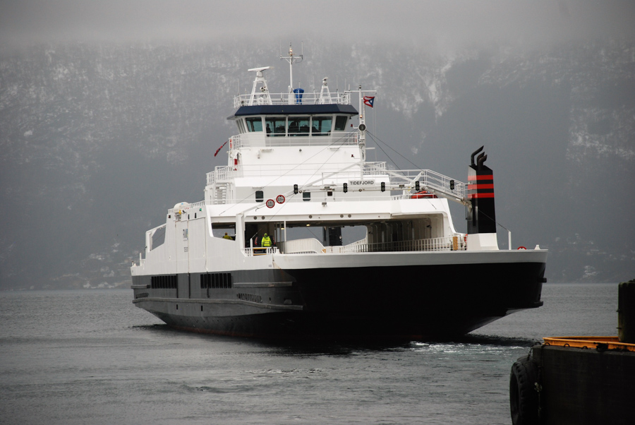 MF «Tidefjord» ved Tørvikbygd fergekai den 14. februar 2019.